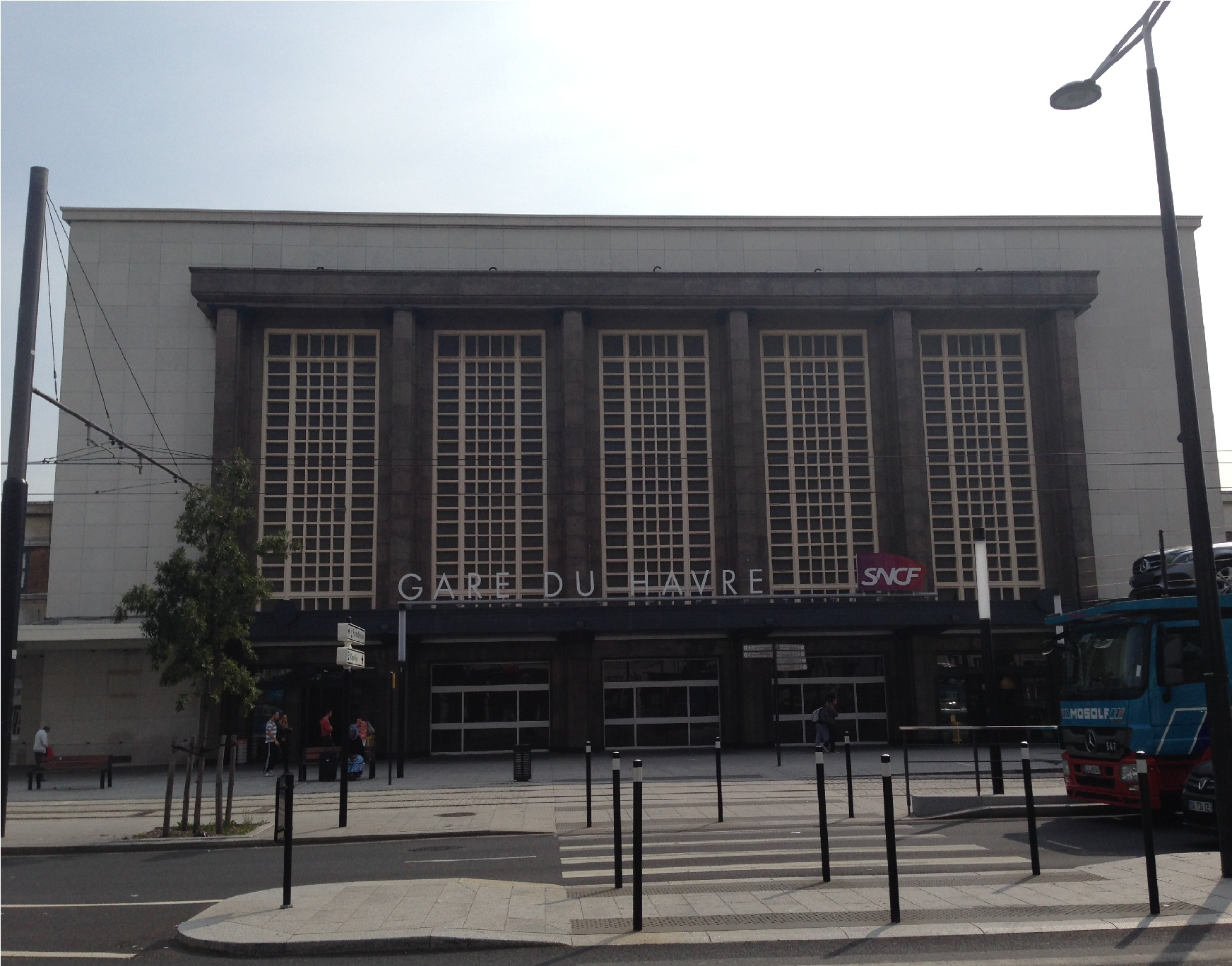 Gare du Havre-2014